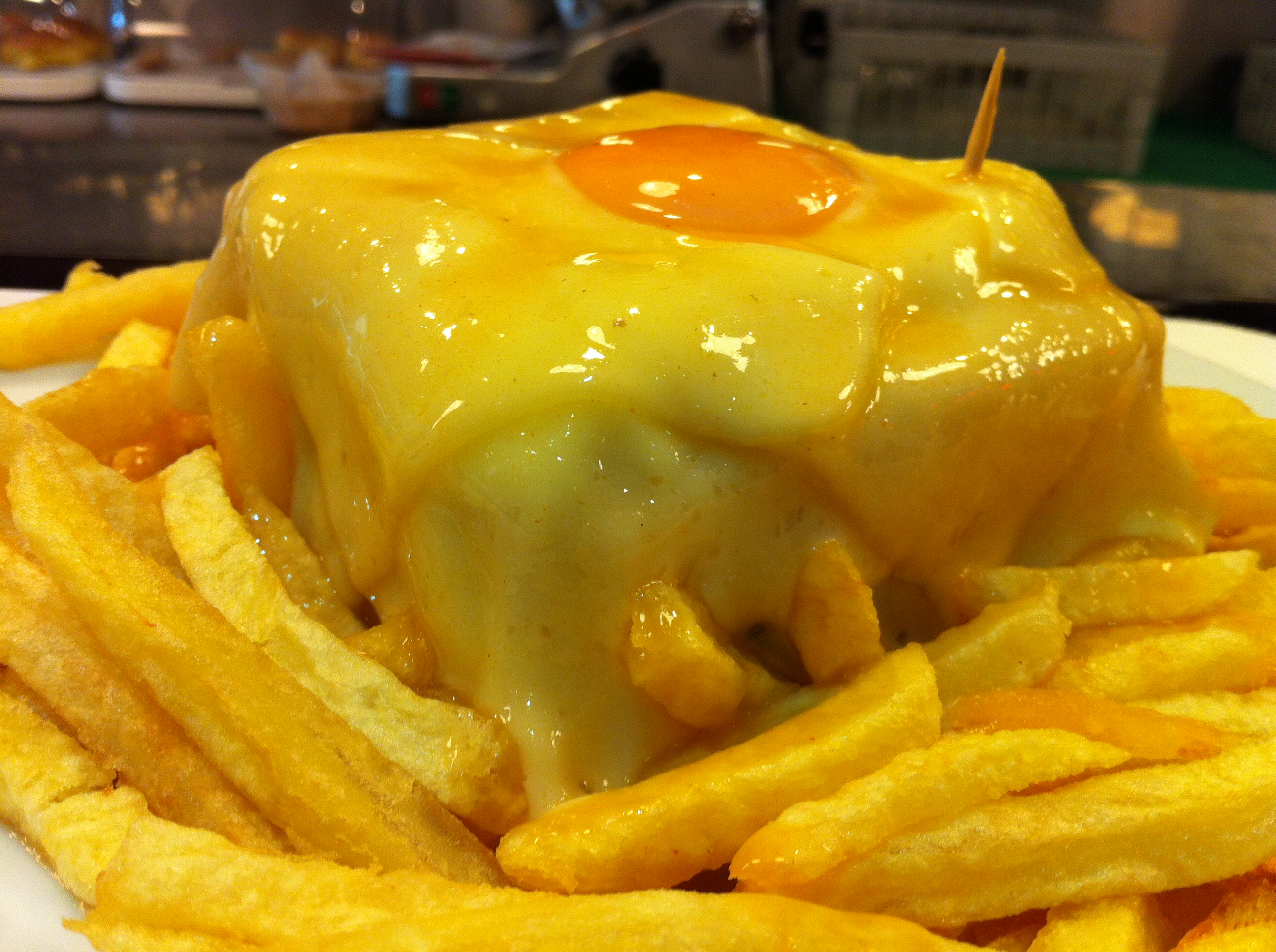 Franchesina